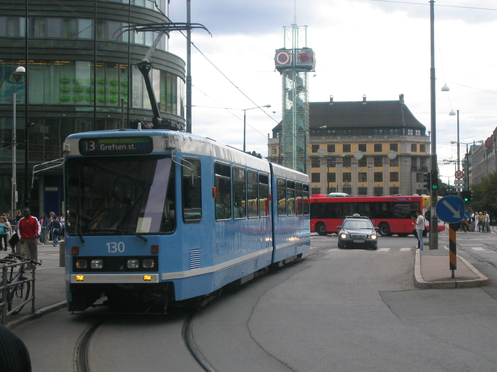 Tram 13 next to Jernbanetorget in Oslo, 2005.